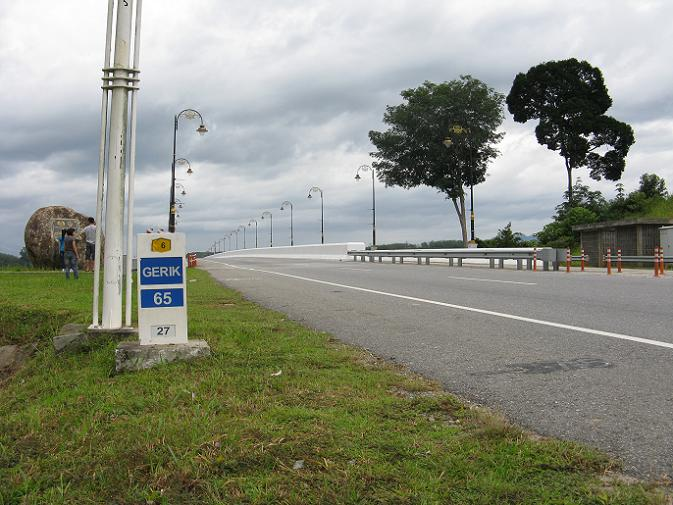 Bridge Raja Muda Nazrin